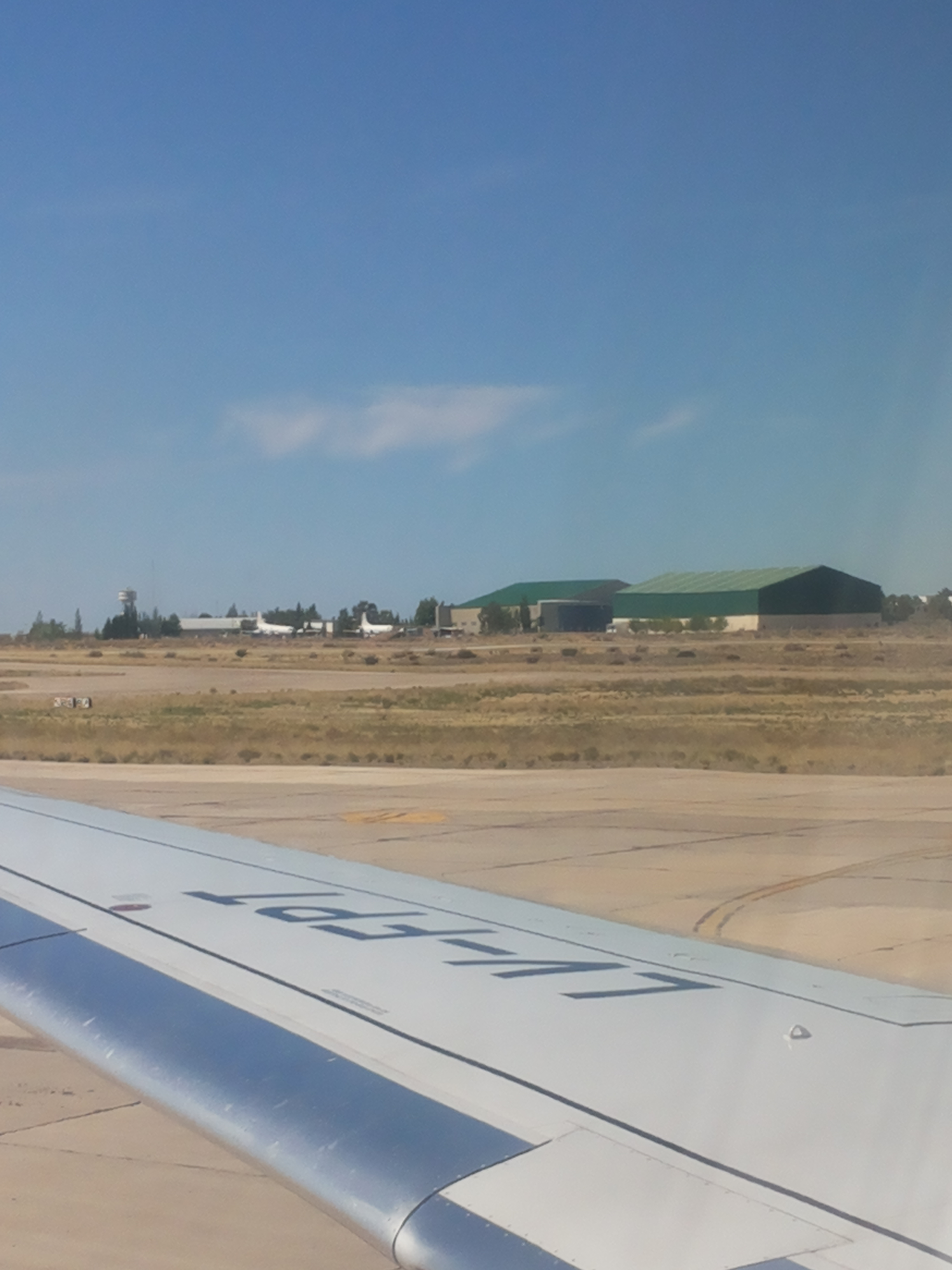 LV-FPT Austral junto a la Base Almirante Zar de Trelew